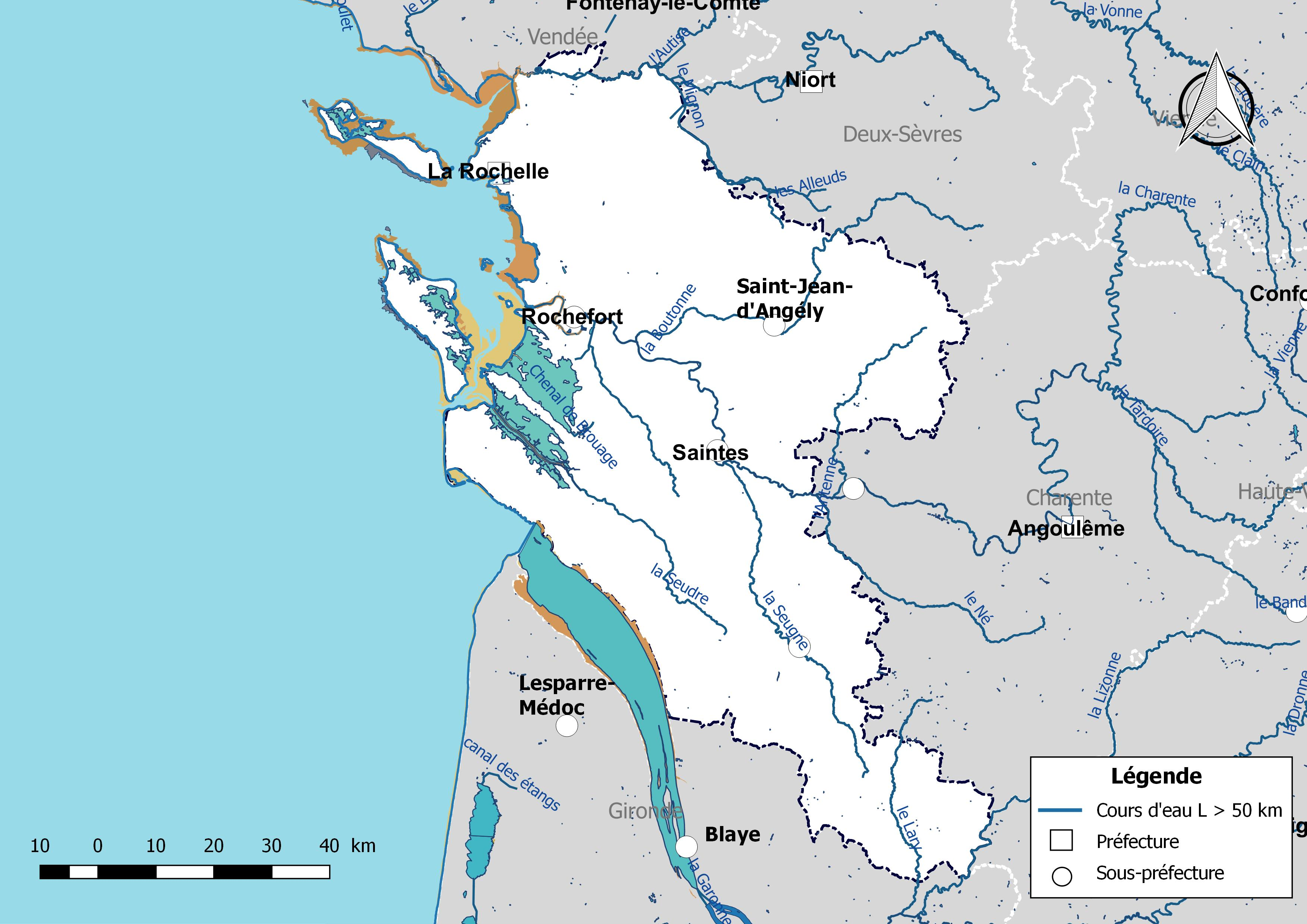 Carte des cours d'eau de longueur supérieure à 50 km drainant le département de la Charente-Maritime (France).